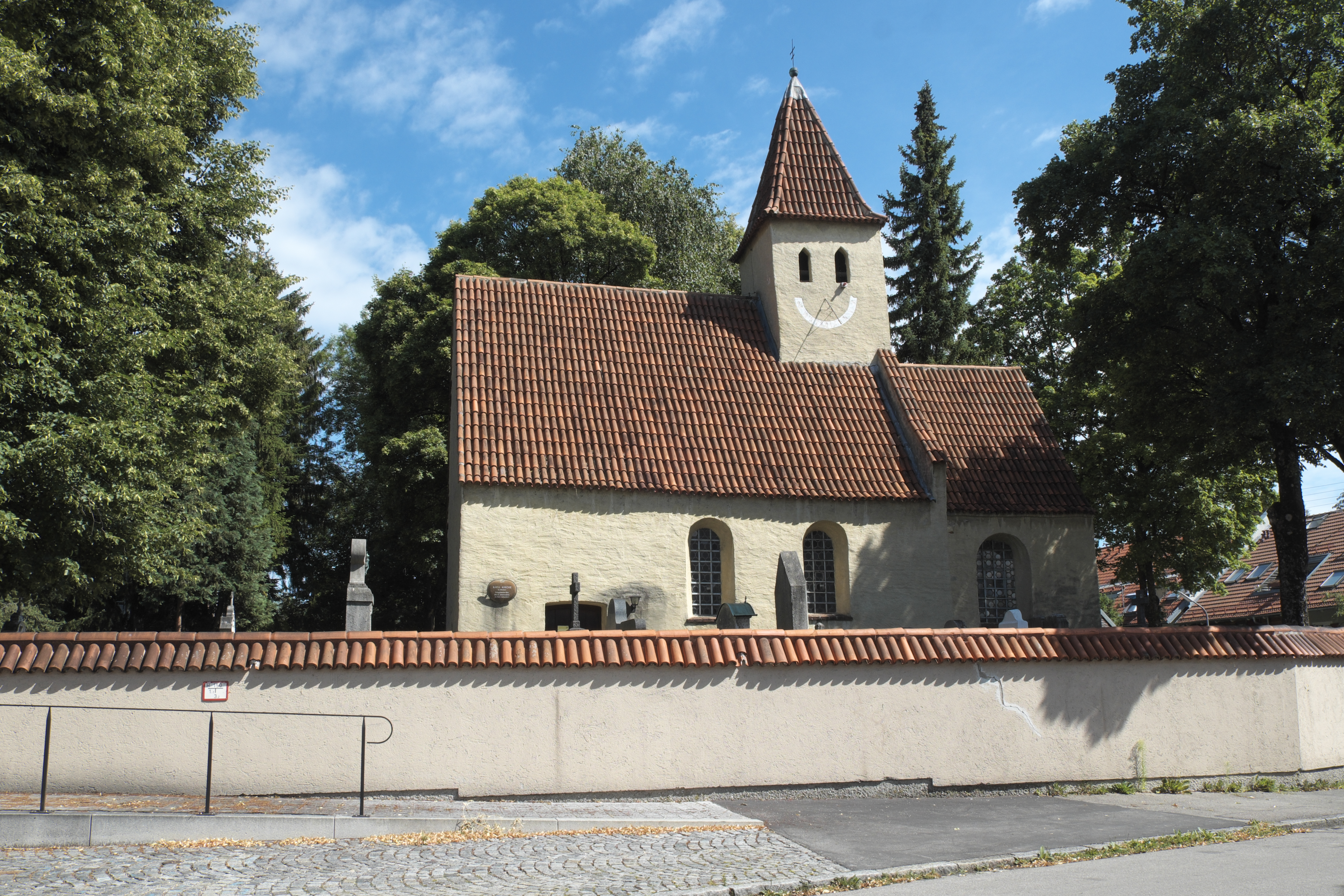 Katholische Kirche St. Nikolaus in Englschalking im Stadtbezirk Bogenhausen in München (Bayern/Deutschland)